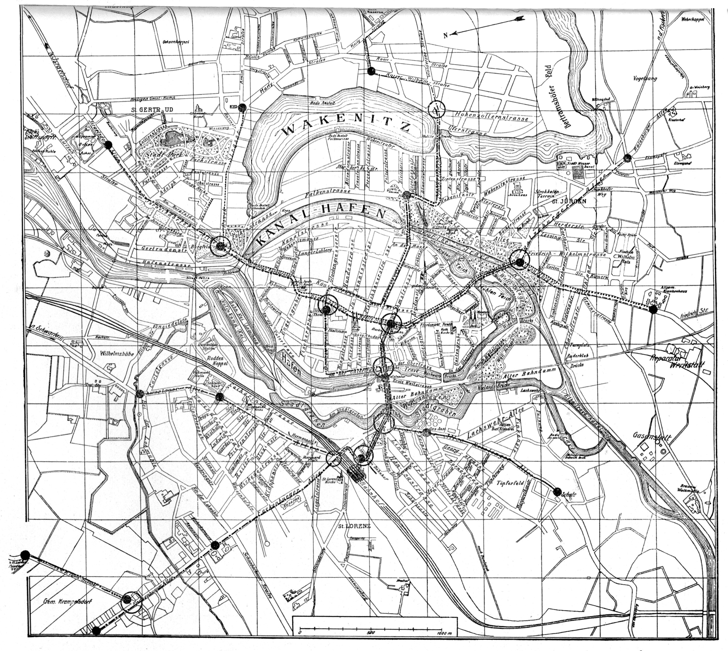 Straßenbahnnetz samt allen Linien der Lübecker Straßenbahn im April 1910.